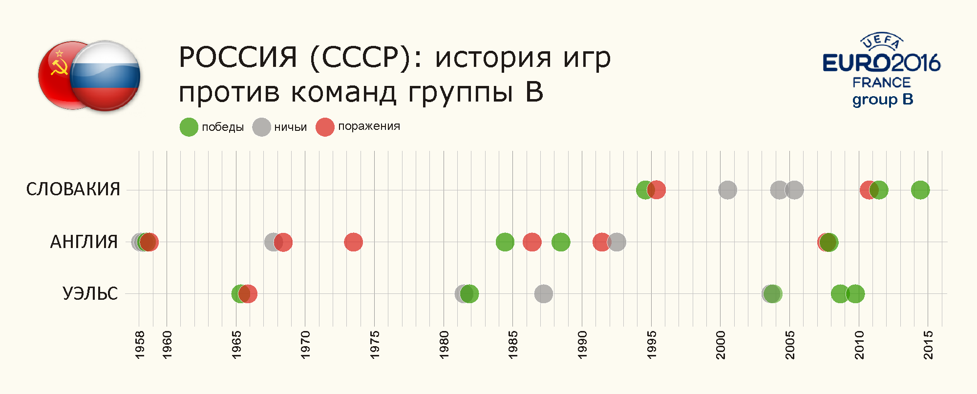 История игр сборной России по футболу с командами группы B Евро-2016